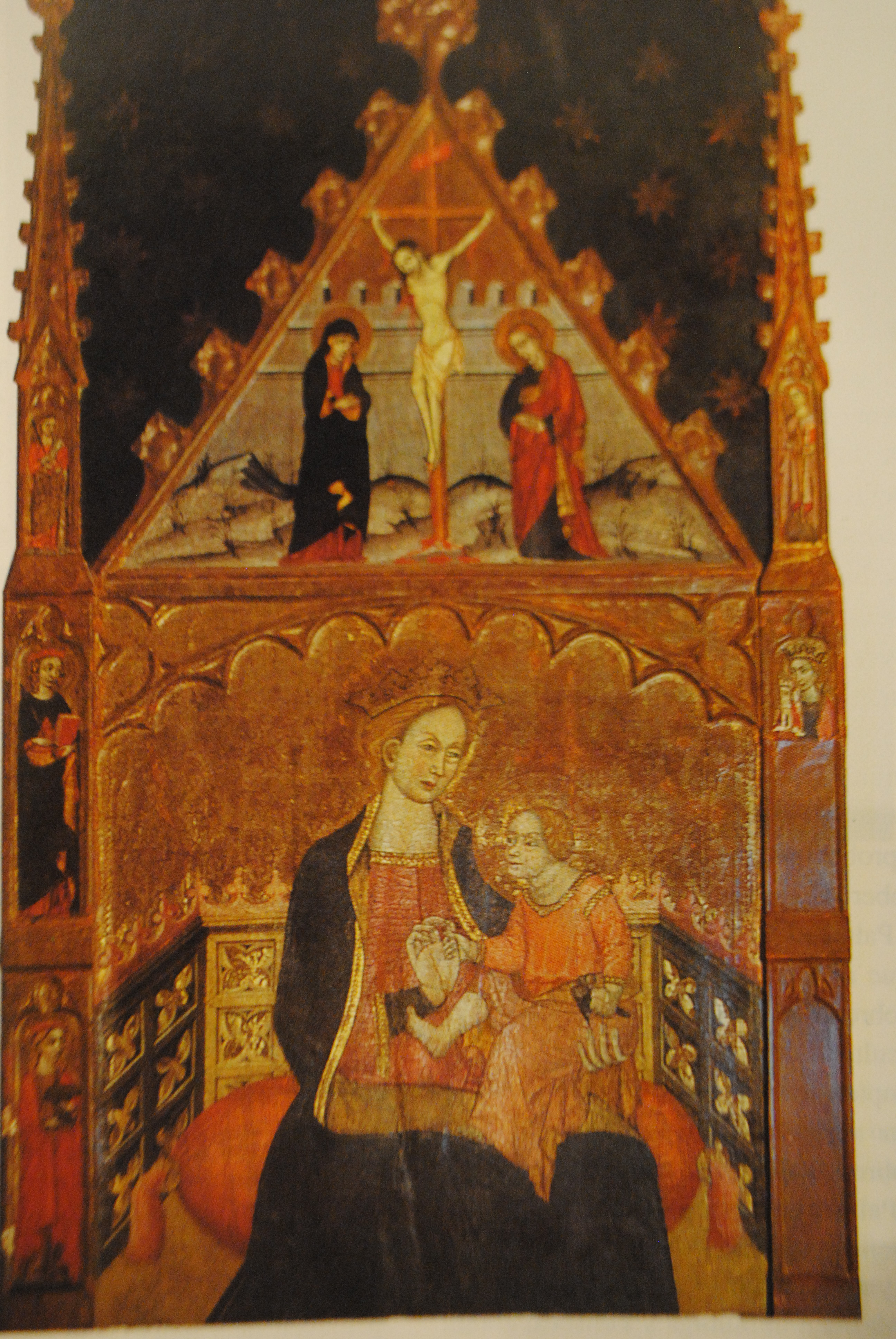 Retaule gòtica de Santa Maria del Camí, obra de Joan Massana.